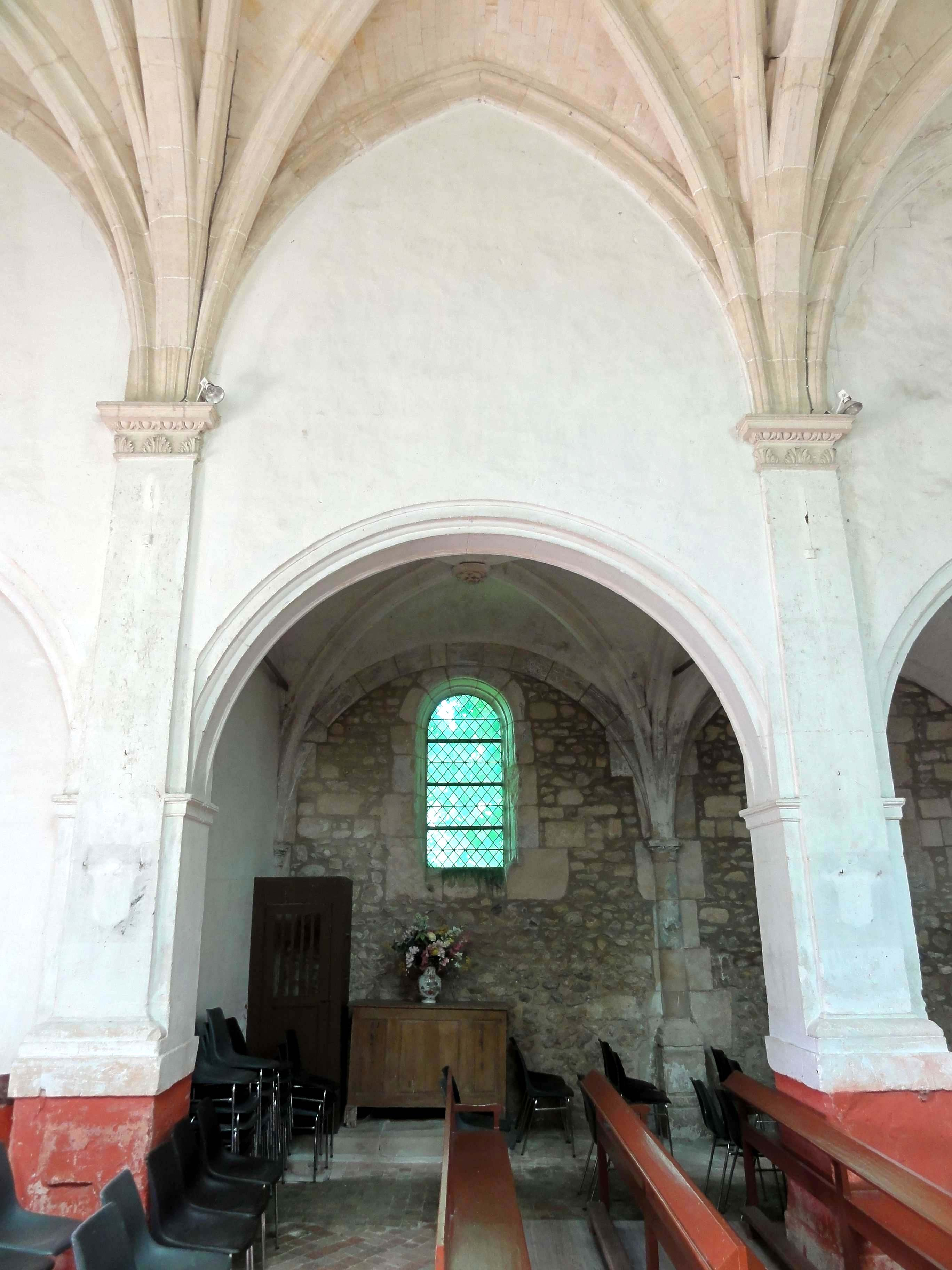 Intérieur de l'église (voir titre).